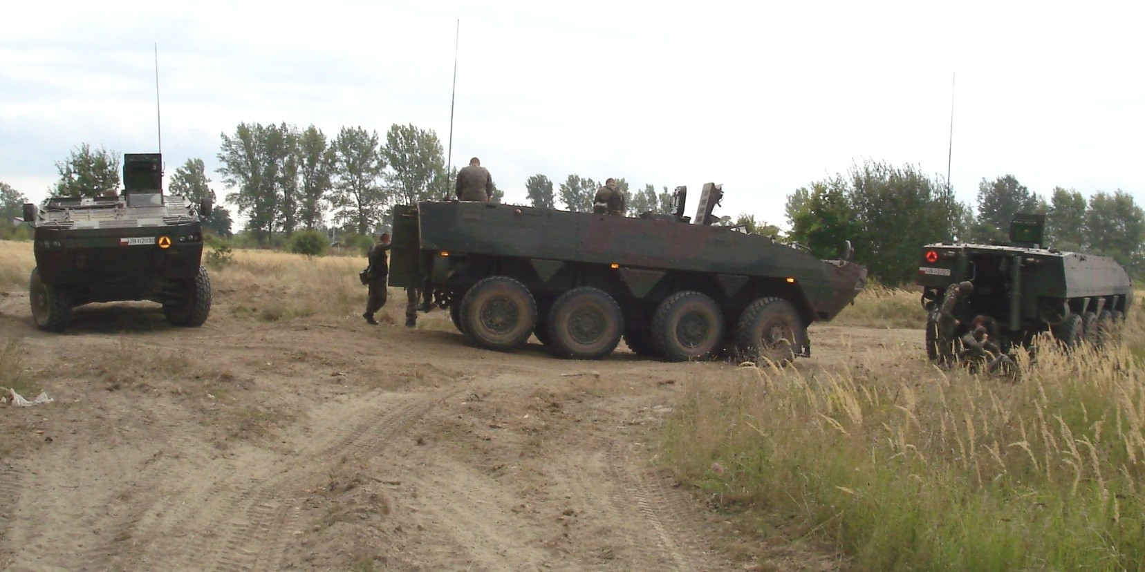 Żołnierze z 2bzmot i rosomaki